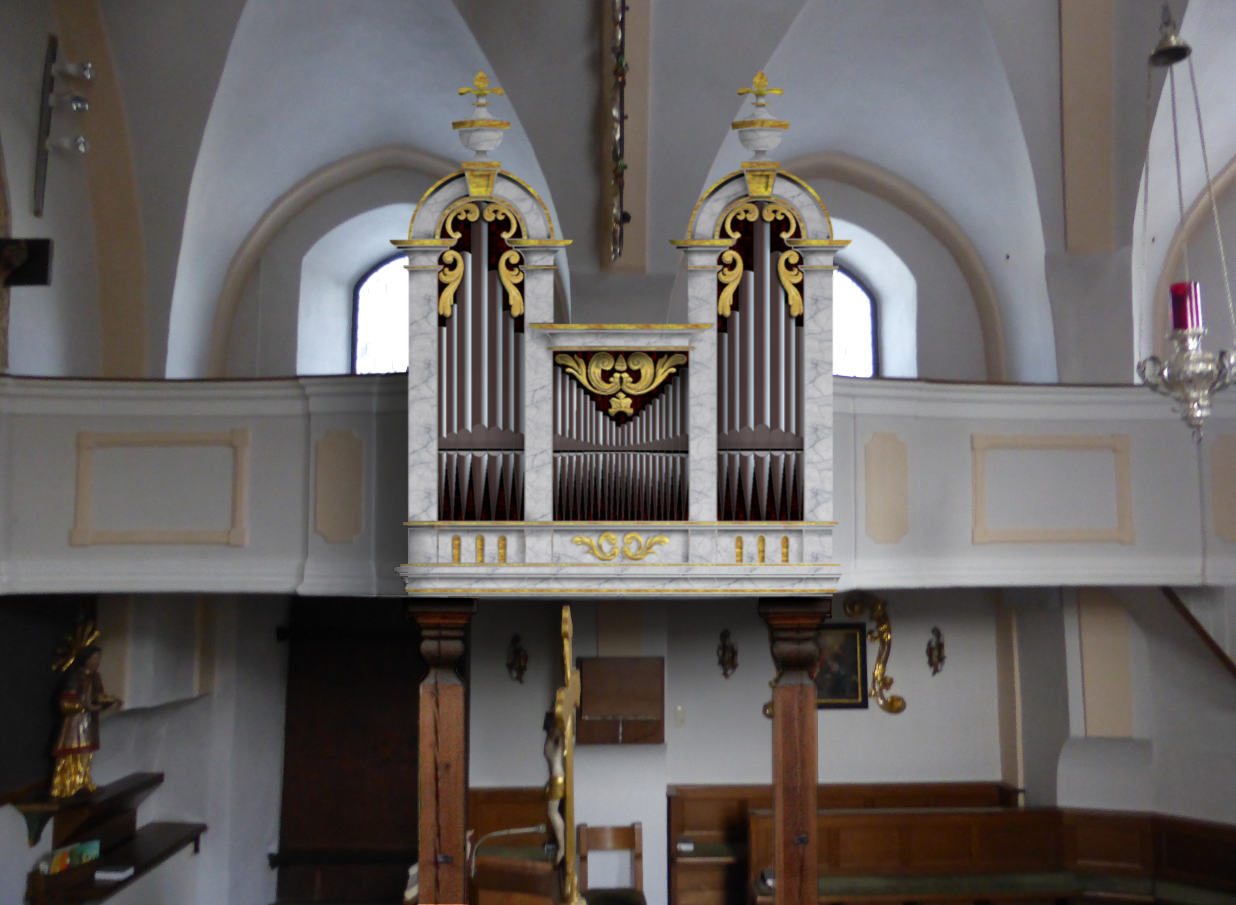 Rekontruktionsversuch: Karl Mauracher-Orgel 1825 bis 1863 in der Vikariatskirche Faistenau, Gehäusetischler: Johann Hacksteiner aus Laufen